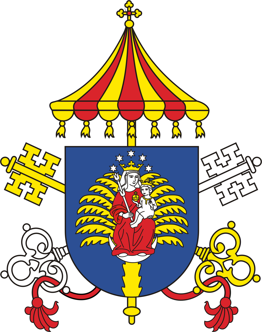 Erb Baziliky v Marianke